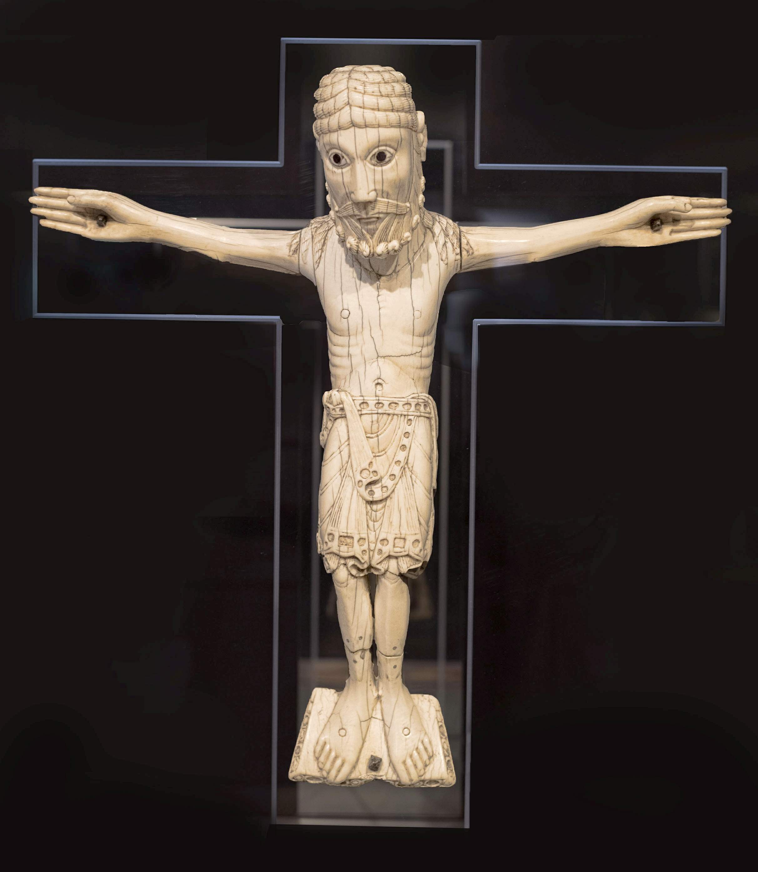 Tallado en marfil, procede del un antiguo monasterio cisterciense llamado Santa María de Carrizo de la Ribera, León, y se supone fue realizado en el taller de marfiles de San Isidoro. Está datado a finales del siglo XI.